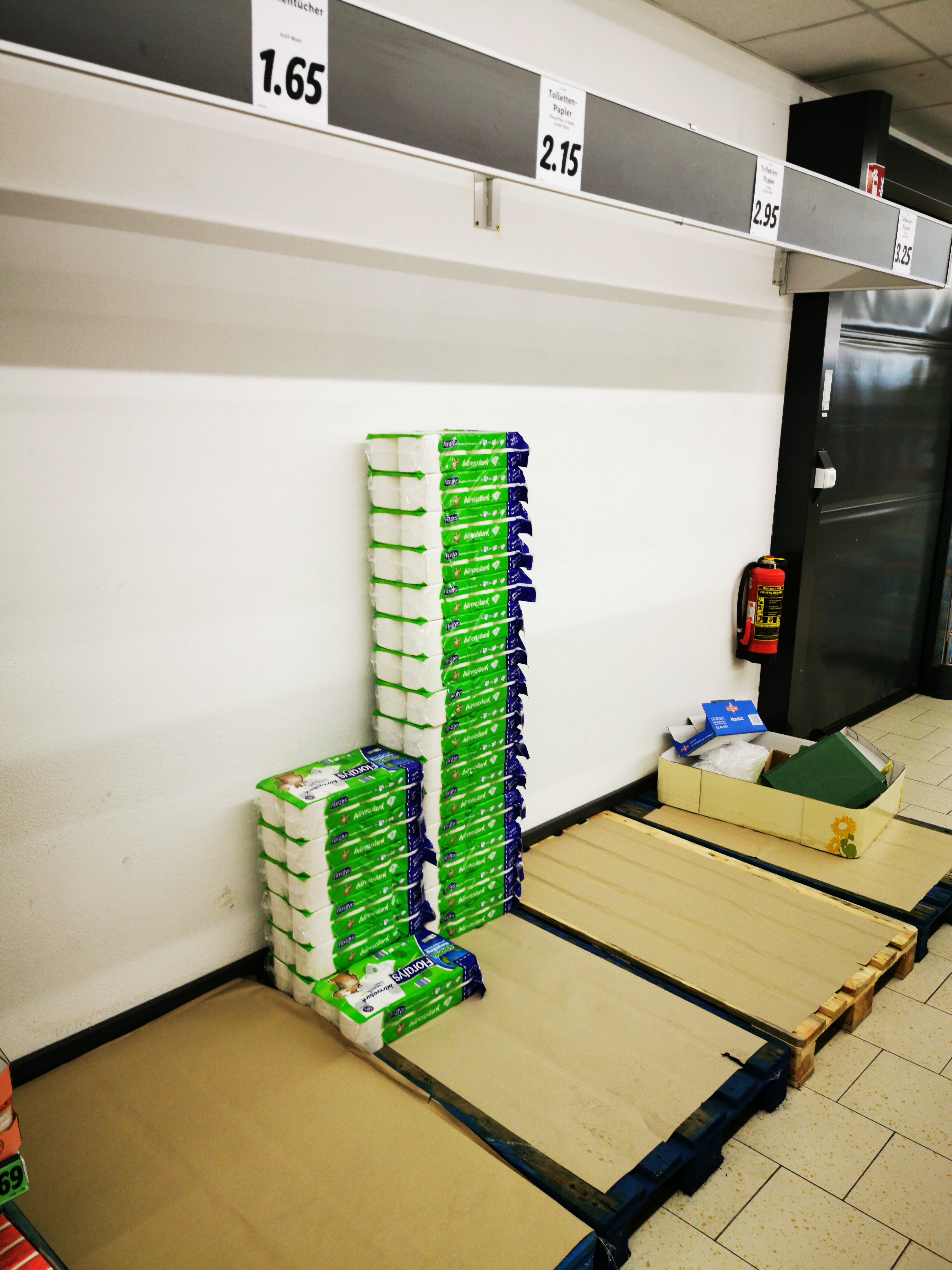 COVID-19-Pandemie Corona-Krise Hamsterkäufe von Toilettenpapier LIDL Tauberbischofsheim